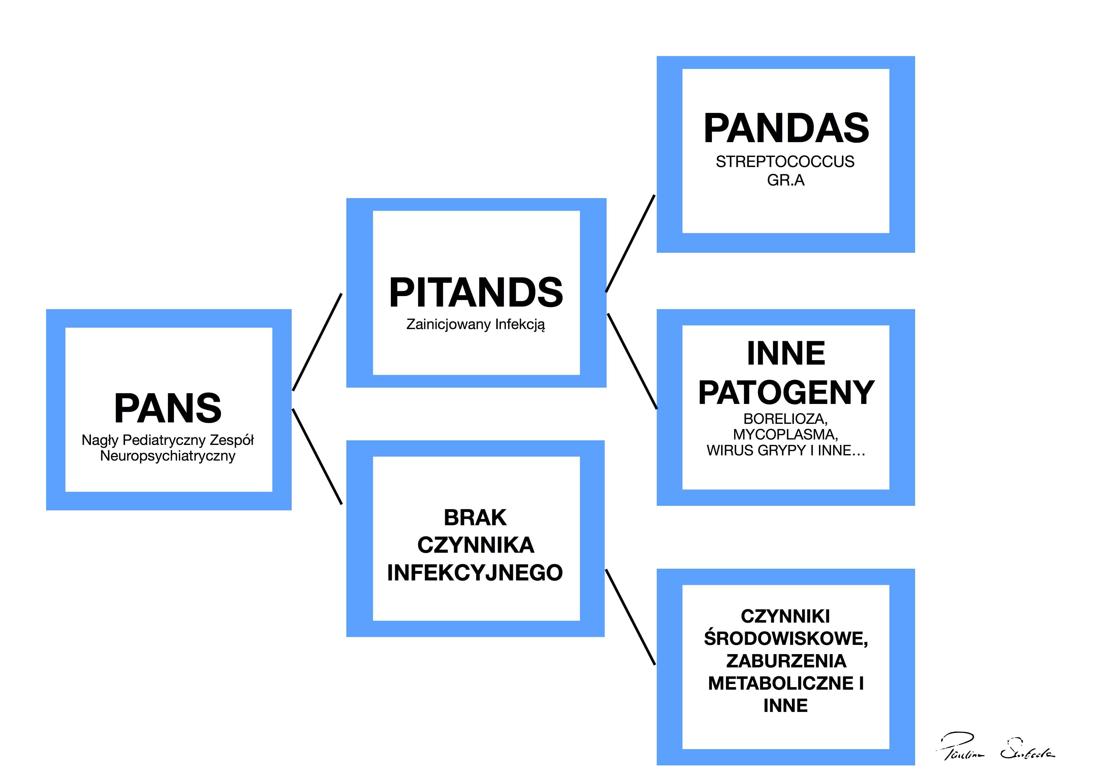 Wykres PANS PANDAS PITANDS